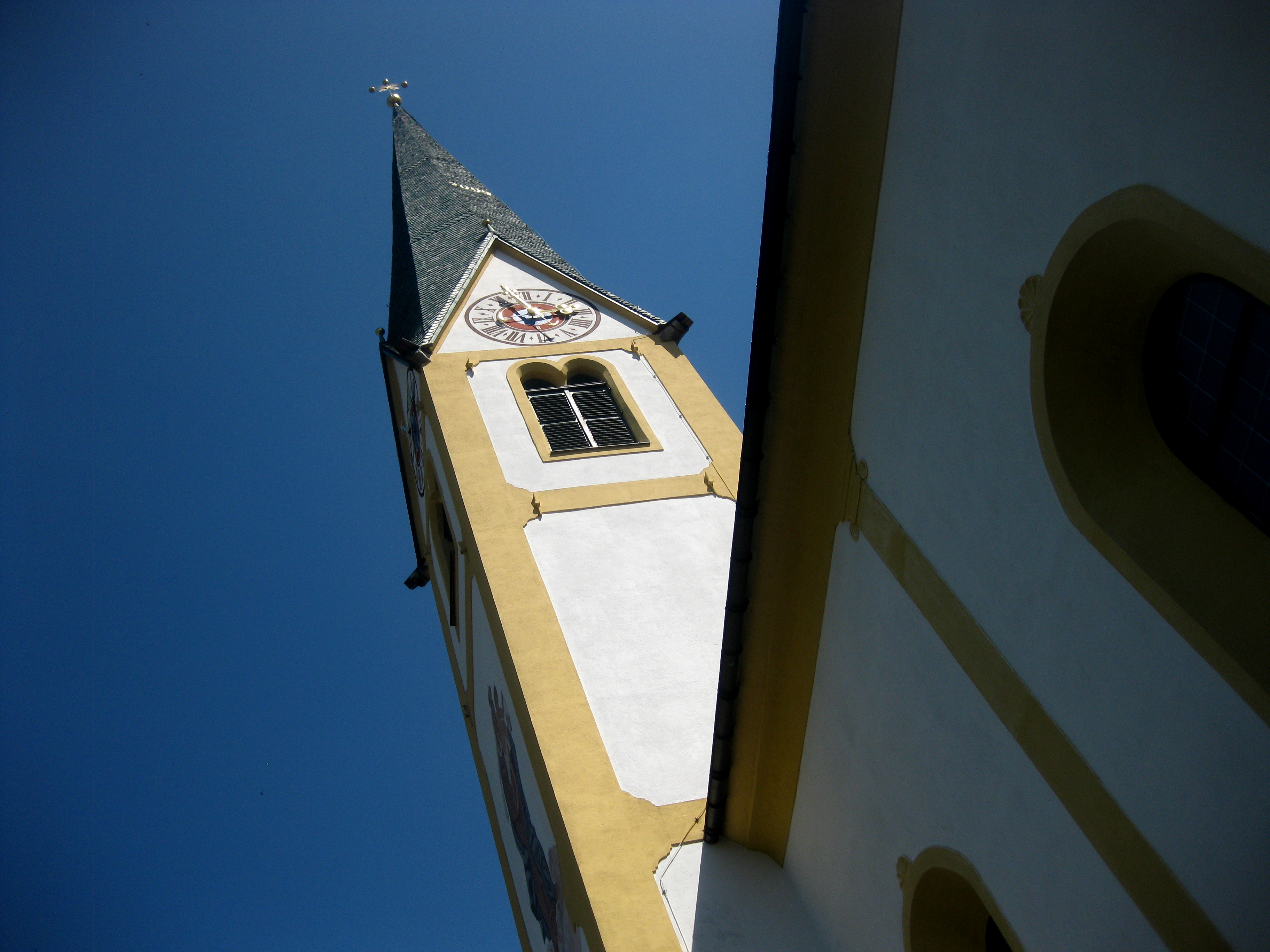 Pfarrkirche Kirchberg in Tirol